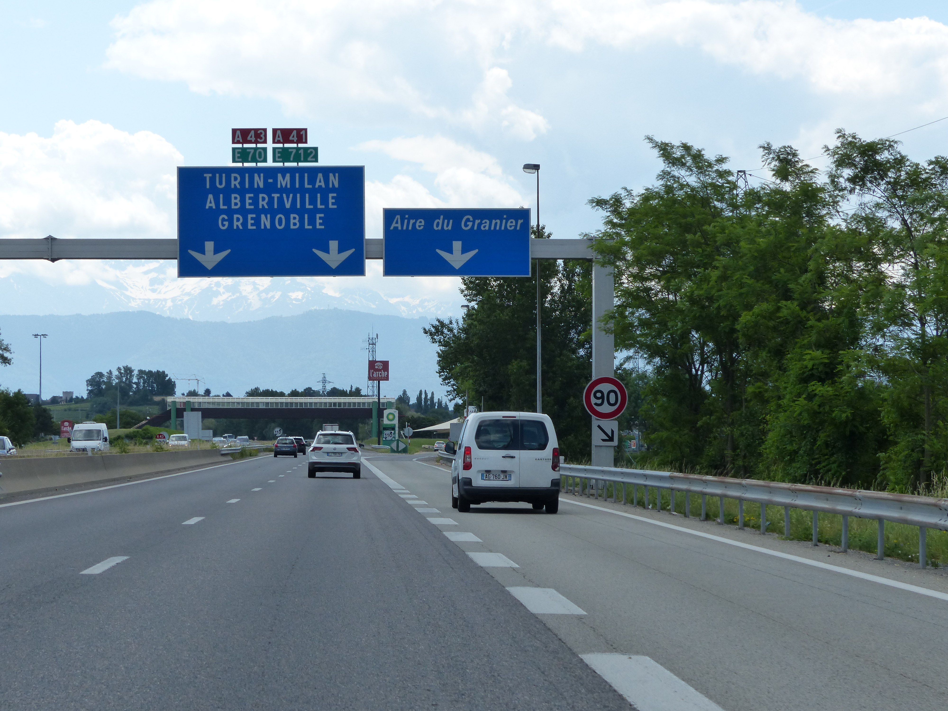 Aire du Granier panneau Da32b, autoroutes A41-A43, Saint-Jeoire-Prieuré, Savoie, France.